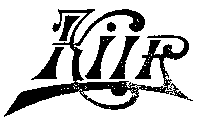 Kiir